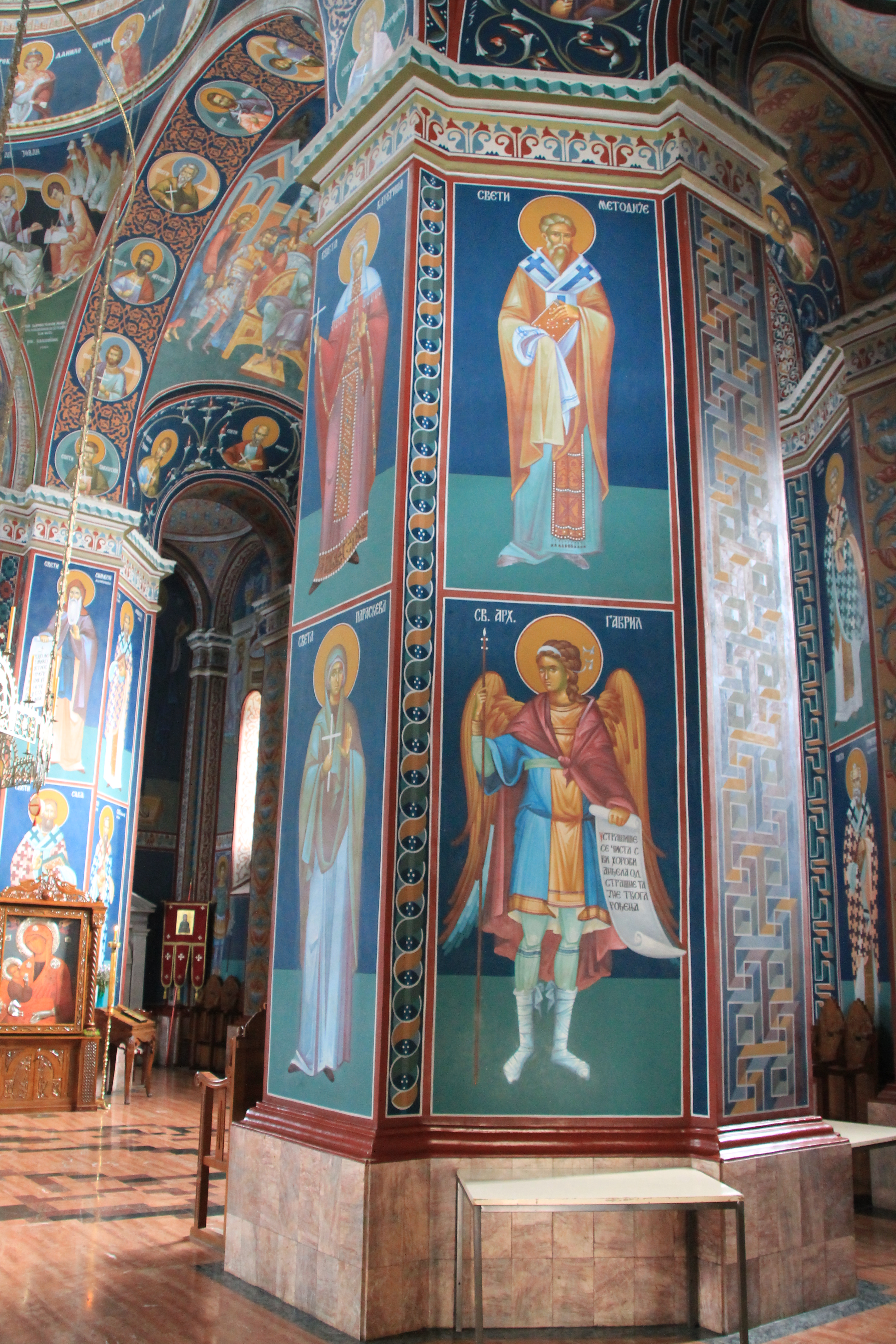 Saborna crkva u Kragujevcu